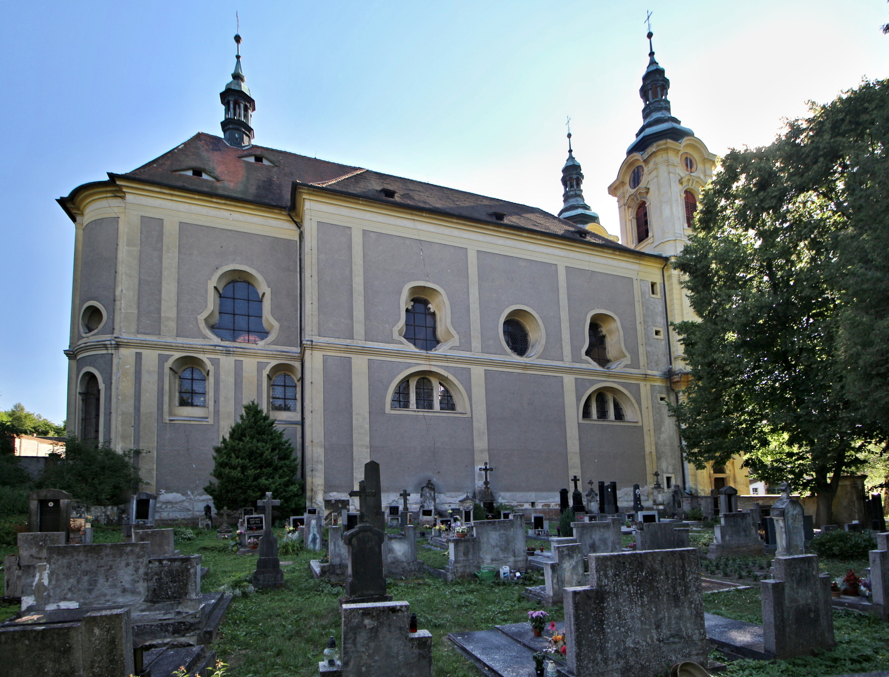 Klášterní kostel Narození Panny Marie v Dolním Ročově